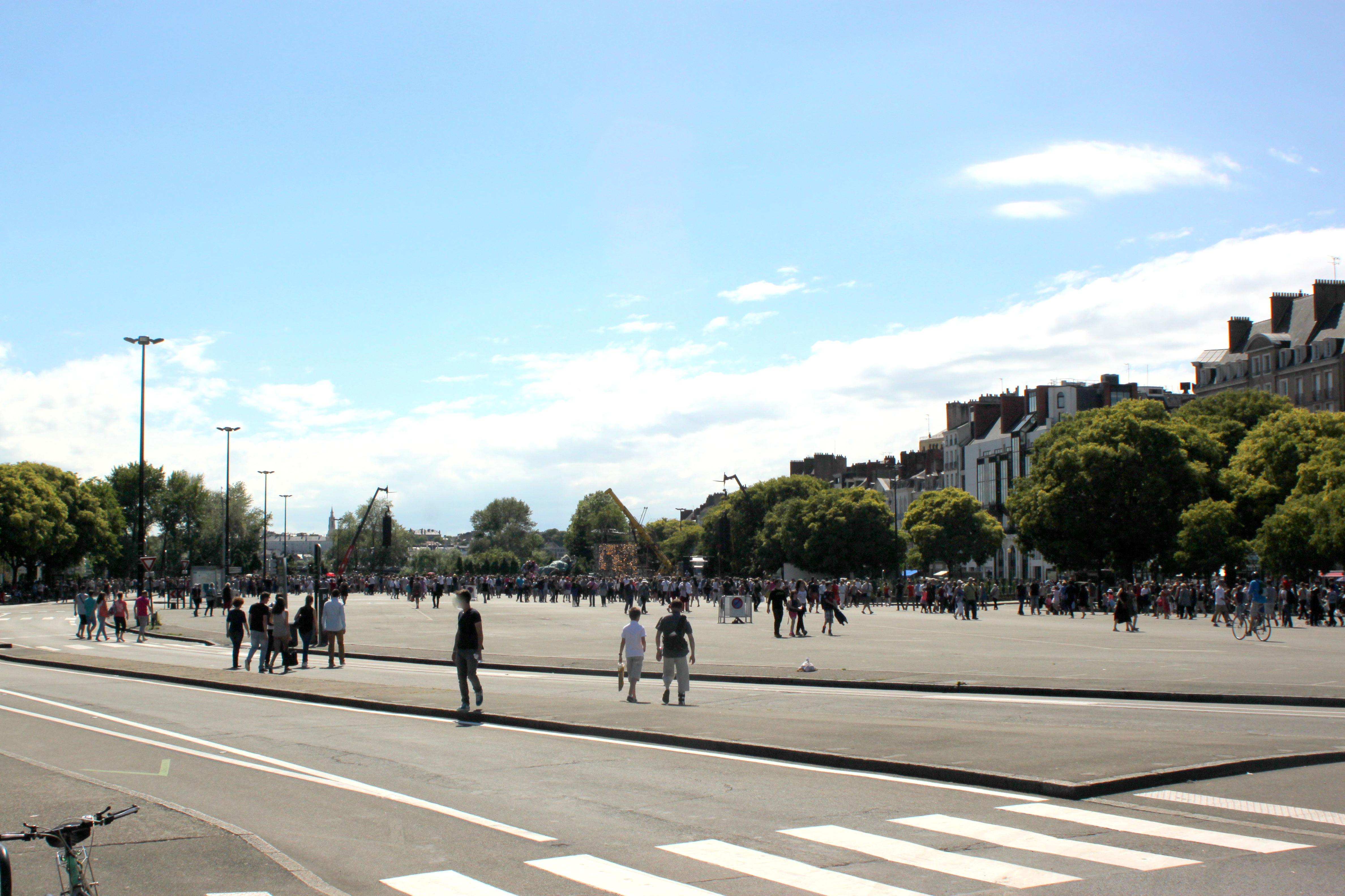 Esplanade de l'île Gloriette, Fr-44-Nantes.